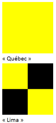 Il s'agit d'information provenant du Code international des signaux